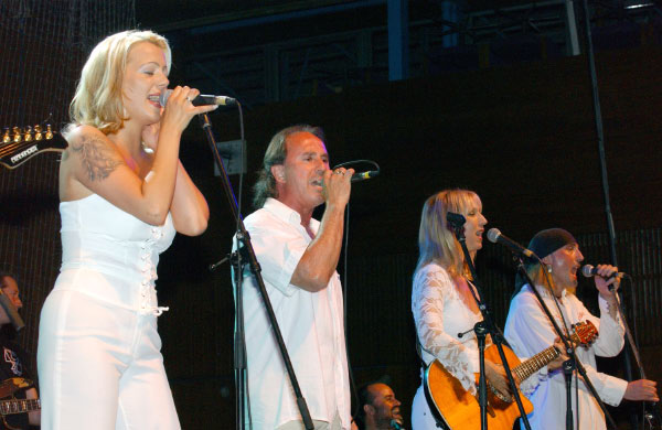 Koncertfelvétel a Kormorán együttesről (Tóth Renáta, Varga Miklós, Géczi Erika, Mr. Basary). Testnevelési Főiskola.